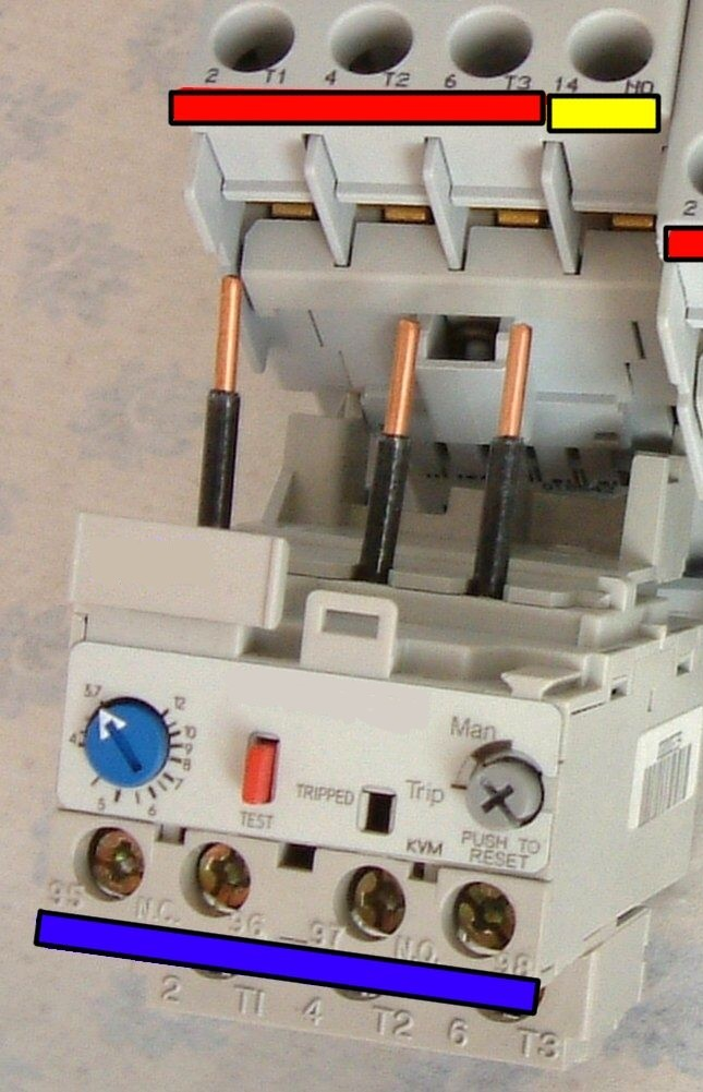 Motorschutzschalter